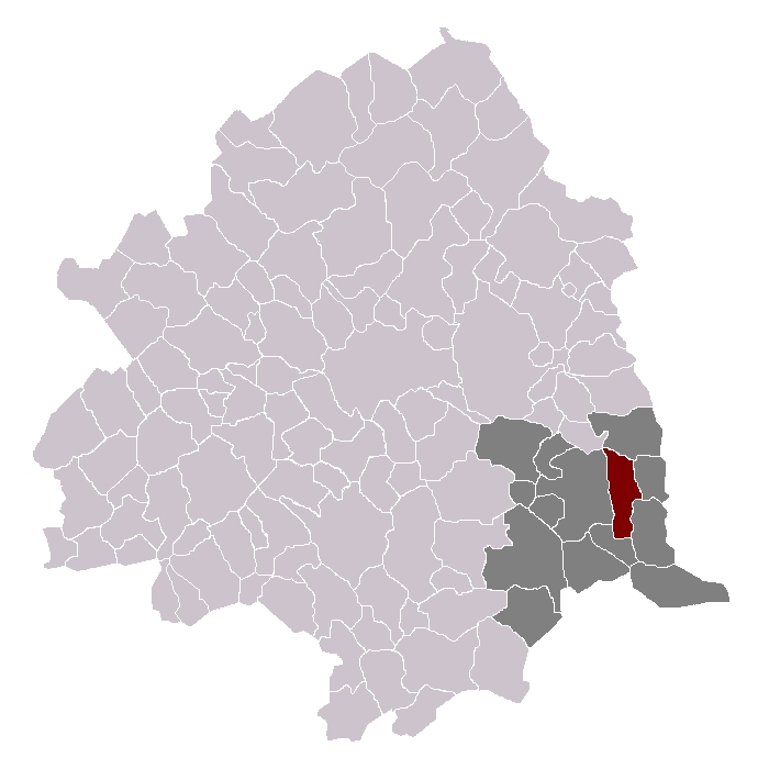 Bourghelles dans son canton et son arrondissement